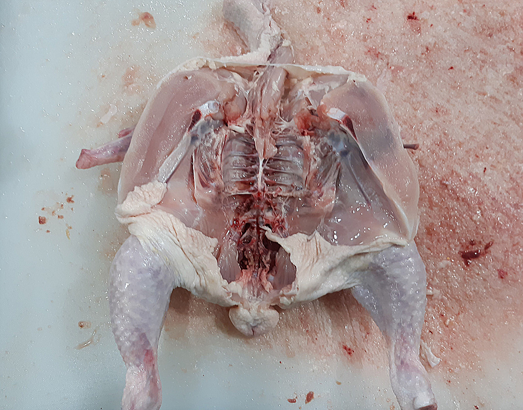 닭고기의 배를 갈라 보았다. 닭고기를 이해하는데 도움이 될것이다.